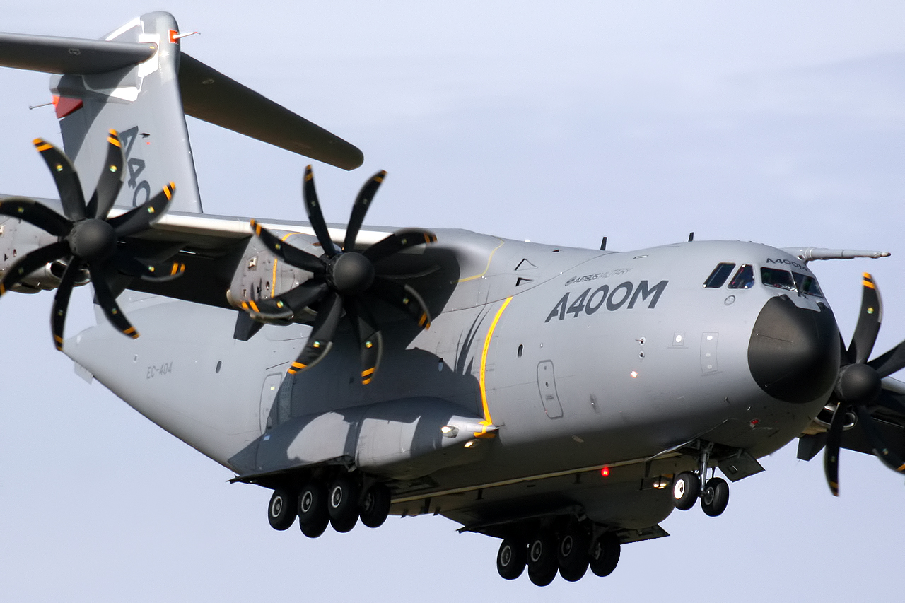 Sevilla LEZL/SVQ Airport